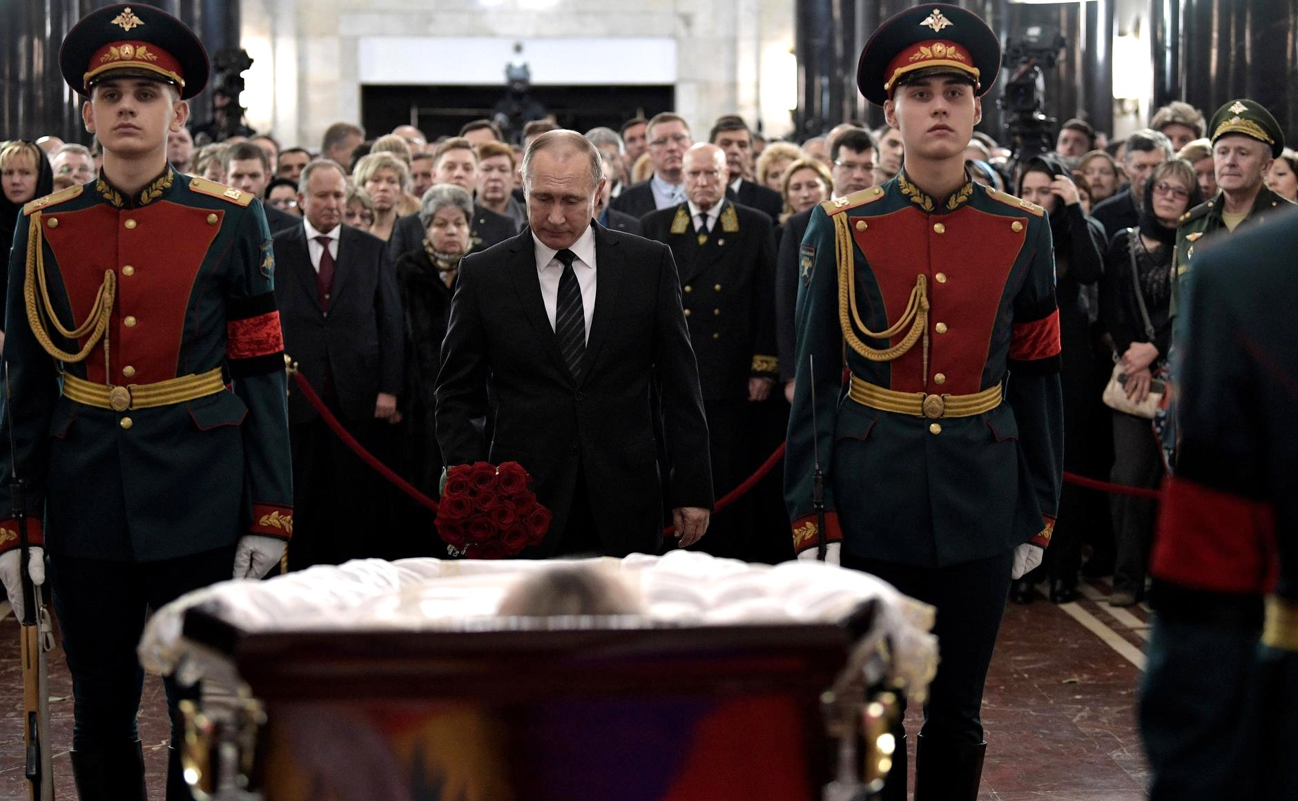 Владимир Путин почтил память посла Российской Федерации в Турции Андрея Карлова, трагически погибшего 19 декабря в Анкаре в результате террористического акта